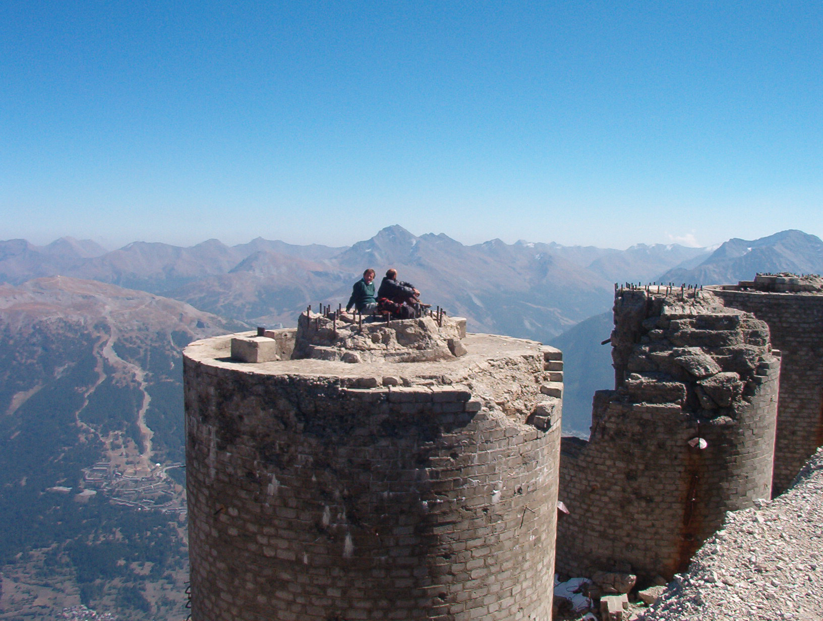 Resti di batterie militari in vetta al monte Chaberton